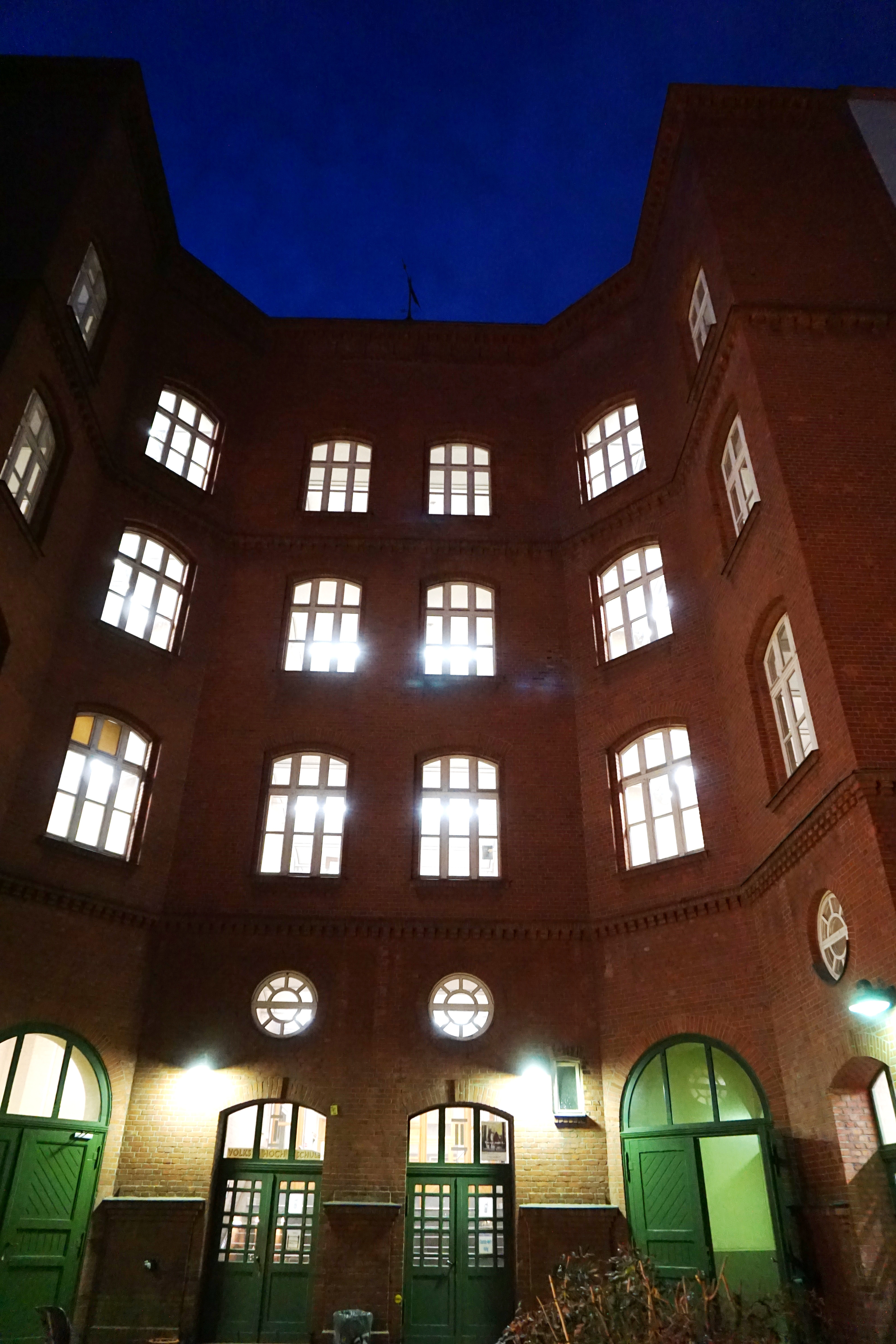 Vorderseite Haupteingang des Gebäudes der VHS City West Pestalozzistr. 40/41